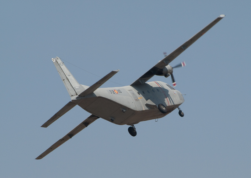 Exhibición de paracaidismo por parte de miembros del Ejército del Aire durante las fiestas de Aranda de Duero en septiembre de 2009